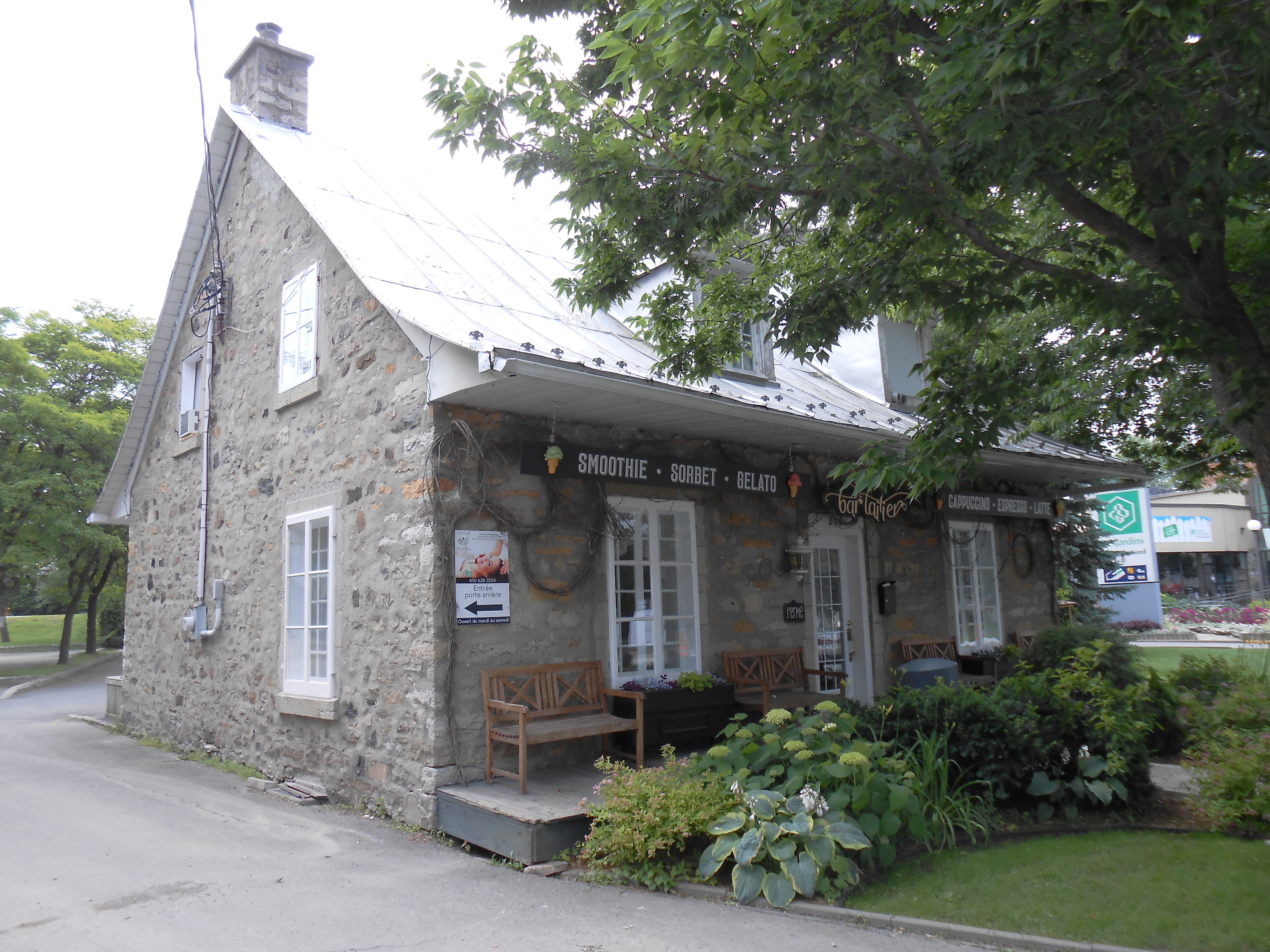 Ancienne résidence du bedeau de Sainte-Rose, 218, boulevard Sainte-Rose, Laval